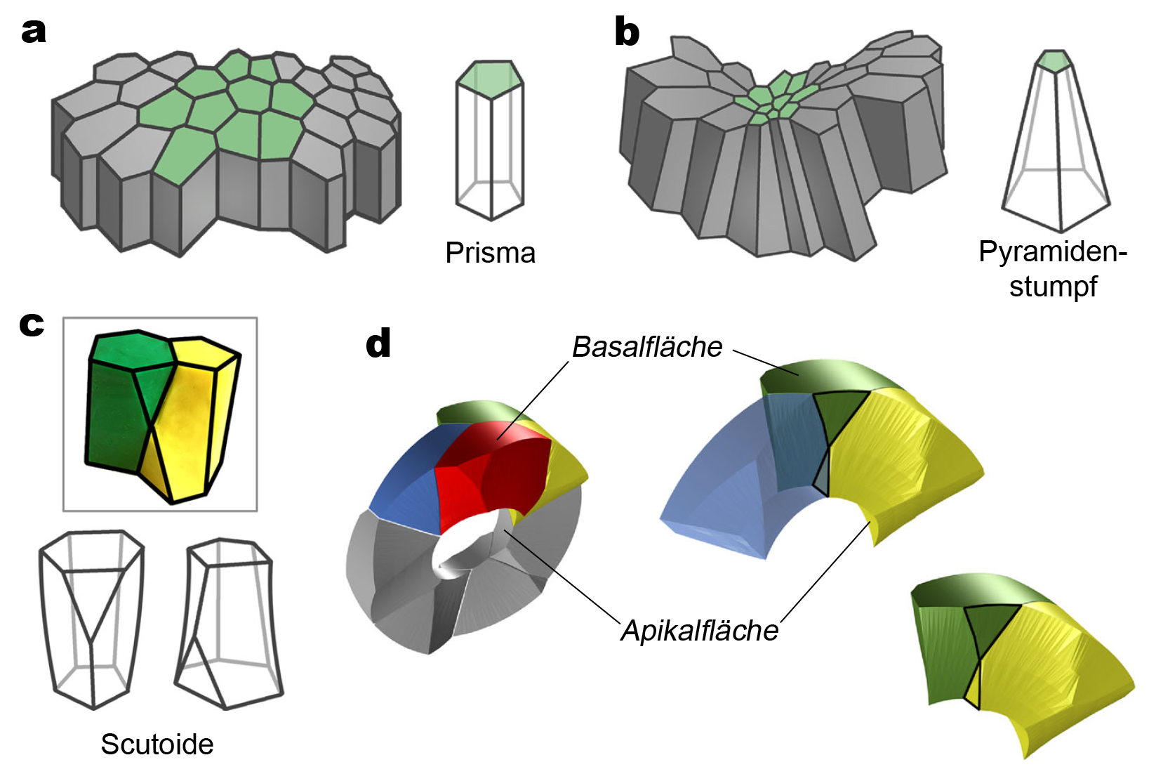 a) Schematische Darstellung eines planaren einschichtigen hochprismatischen oder isoprismatischen (kubischen) Epithels – die Zellen sind vereinfacht als Prismen dargestellt. b) Schematische Darstellung einer Einstülpung oder Faltung eines einschichtigen hochprismatischen oder isoprismatischen (kubischen) Epithels – die Zellen nehmen die sogenannte Flaschenform an, die vereinfacht als Pyramidenstumpf betrachtet werden kann. c) Modelle zweier Scutoide aus Knetmasse, die, jeweils entgegengesetzt orientiert, perfekt aneinanderpassen, sowie eine schematische grafische Darstellung zweier Scutoide. d) 3D-Modell von Zellen eines einschichtigen röhrenförmigen Epithels mit einem Innendurchmesser-Außendurchmesser-Verhältnis von 2,5. Die vier verschiedenfarbigen Zellen (grün, gelb, blau und rot) zeigen das Phänomen der „apico-basal cell intercalation“: zwei Zellen, die an der Basalfläche unmittelbar aneinandergrenzen (grün und rot) tun dies nicht an der Apikalfläche, dafür aber deren unmittelbares Nachbarzellenpaar (blau und gelb) – und umgekehrt; in den beiden Detailabbildungen sind zur besseren Nachvollziehbarkeit der Kontaktflächenverläufe die rote bzw. die rote und blaue Zelle weggelassen.